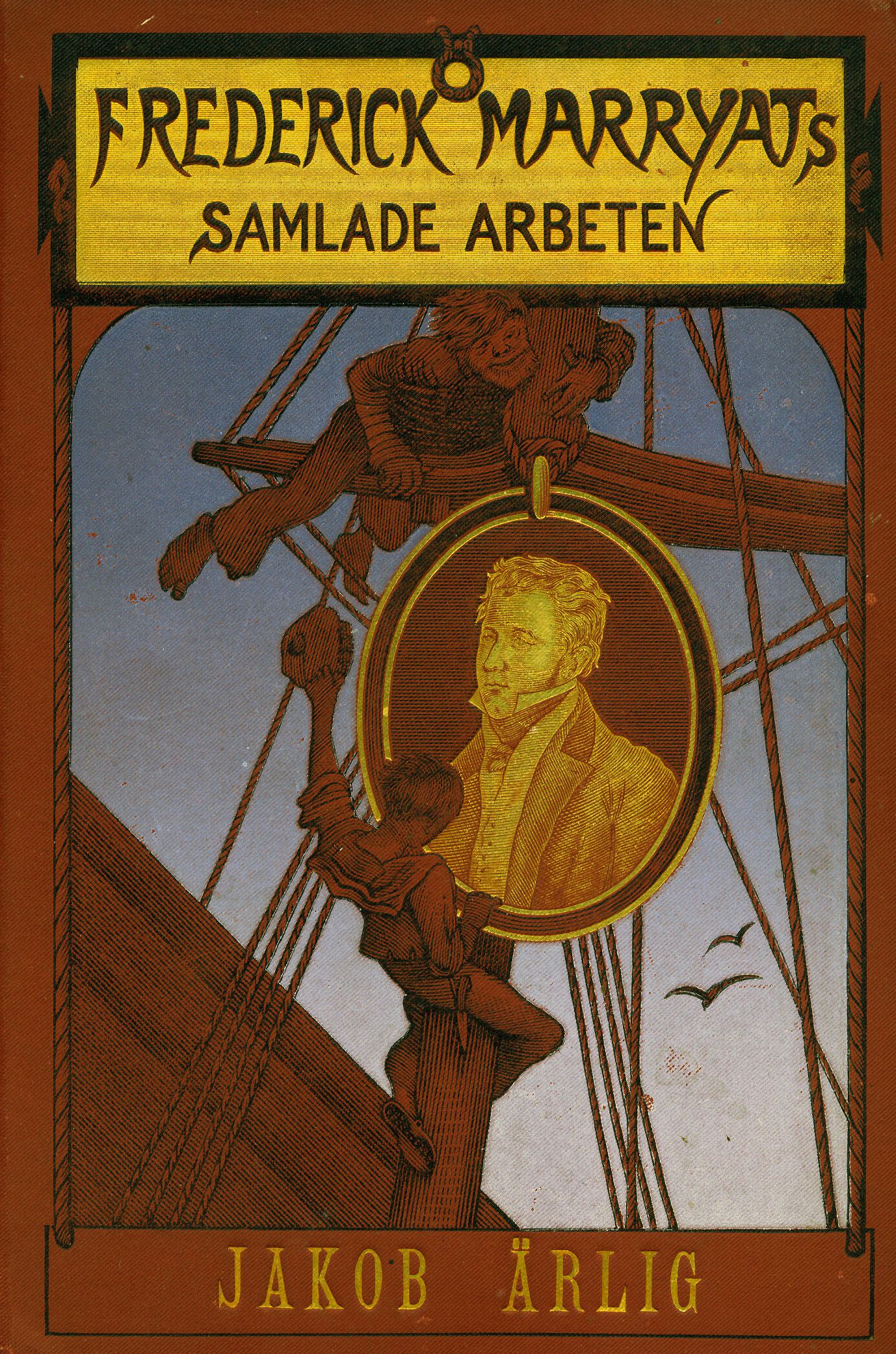 Binding cover: Frederick Marryats samlade arbeten. Jakob Ärlig.